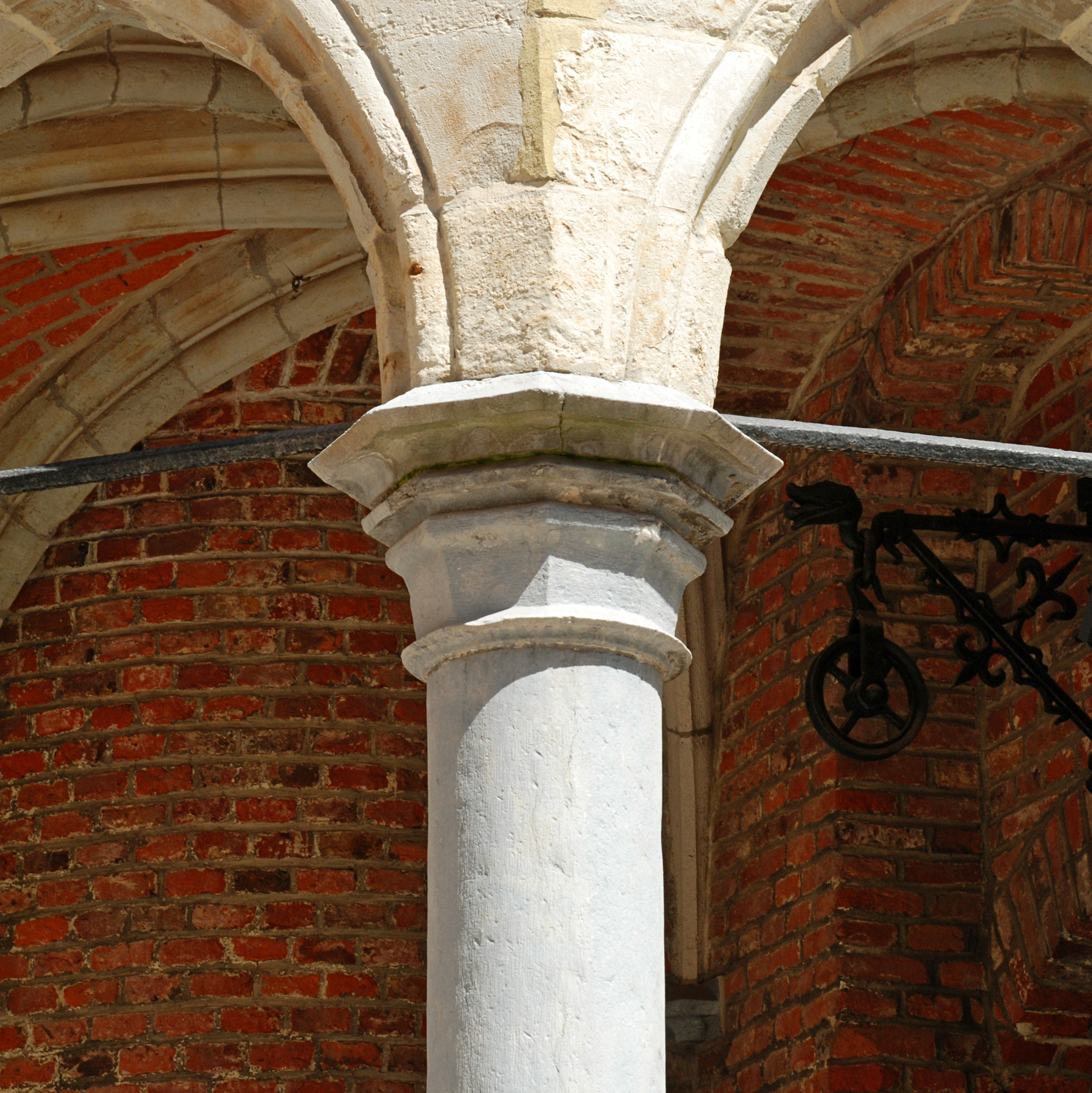 Belgique - Gand - Maison de l'Arrière-Faucille (14e-15e-16e siècles)